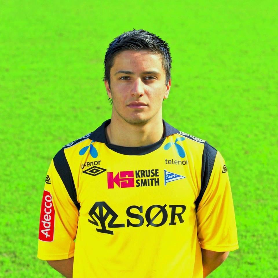 dardan portrett ik start